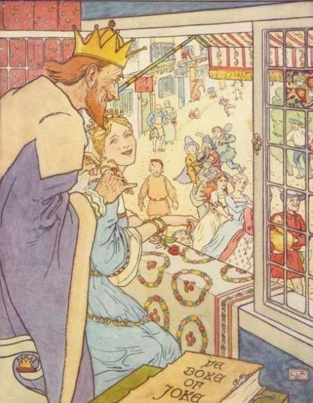 Leslie Brooke, Golden Goose : Simplet et sa suite arrivent en ville ; la princesse éclate de rire.